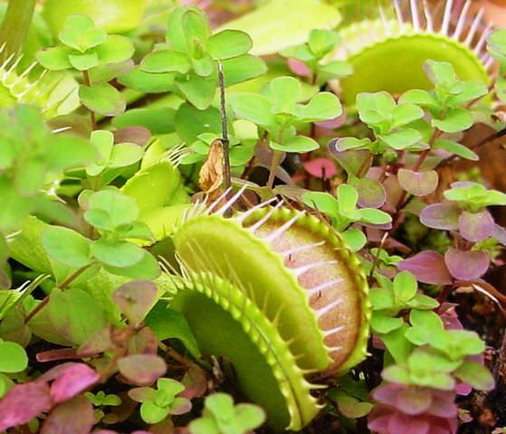 Dioanea muscipula (Giardino dei Semplici, Florence, Italy)